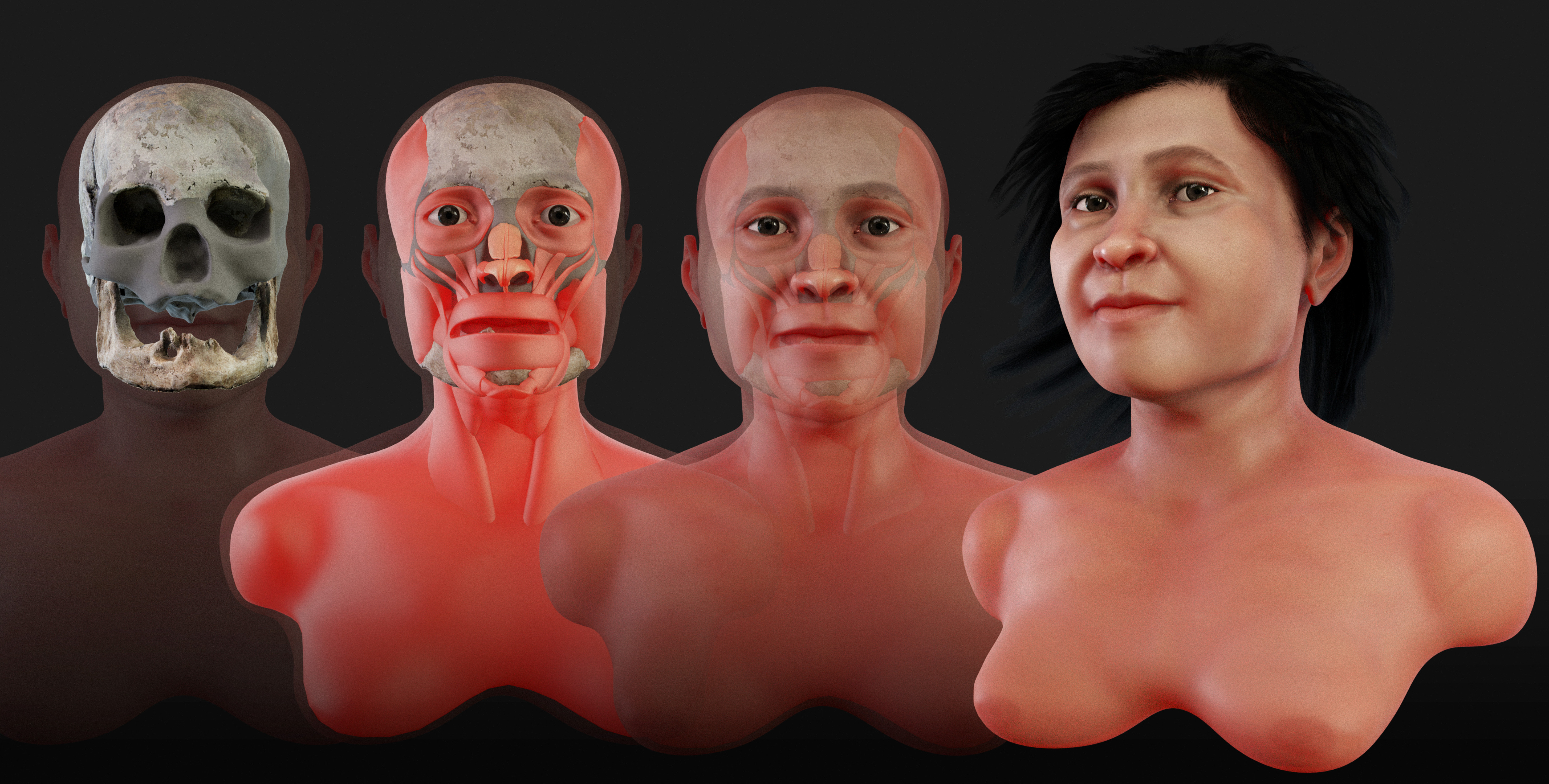 A reconstrução facial forense da Eva de Naharon é uma parceria entre: Octavio del Río, Instituto Nacional de Antropología e Historia (INAH) do México e Cicero Moraes.